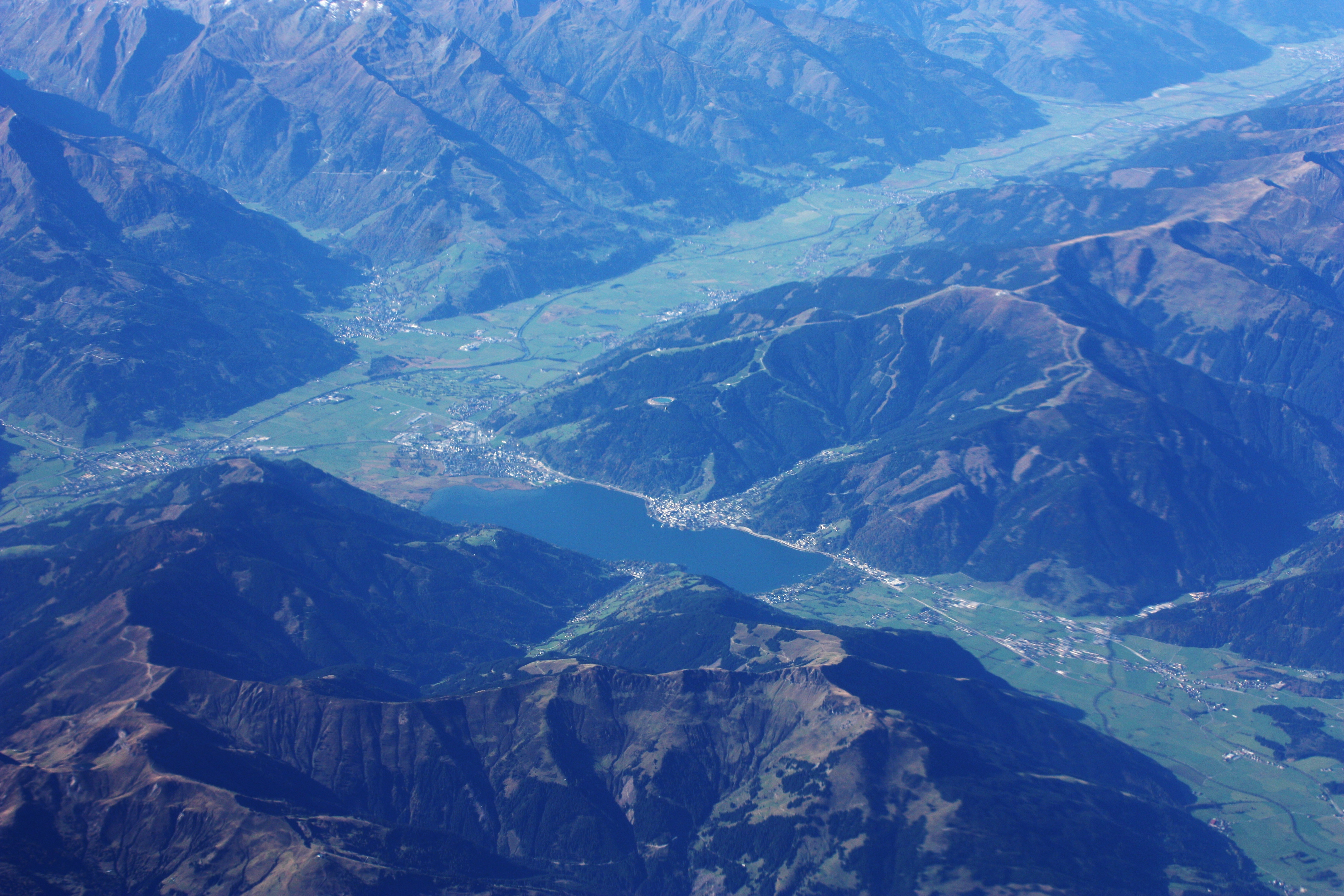 1 Flug von Frankfurt/Main nach Sofia; Start 10:12 MEZ; Landung 13:06 MEZ; Oktober 2010